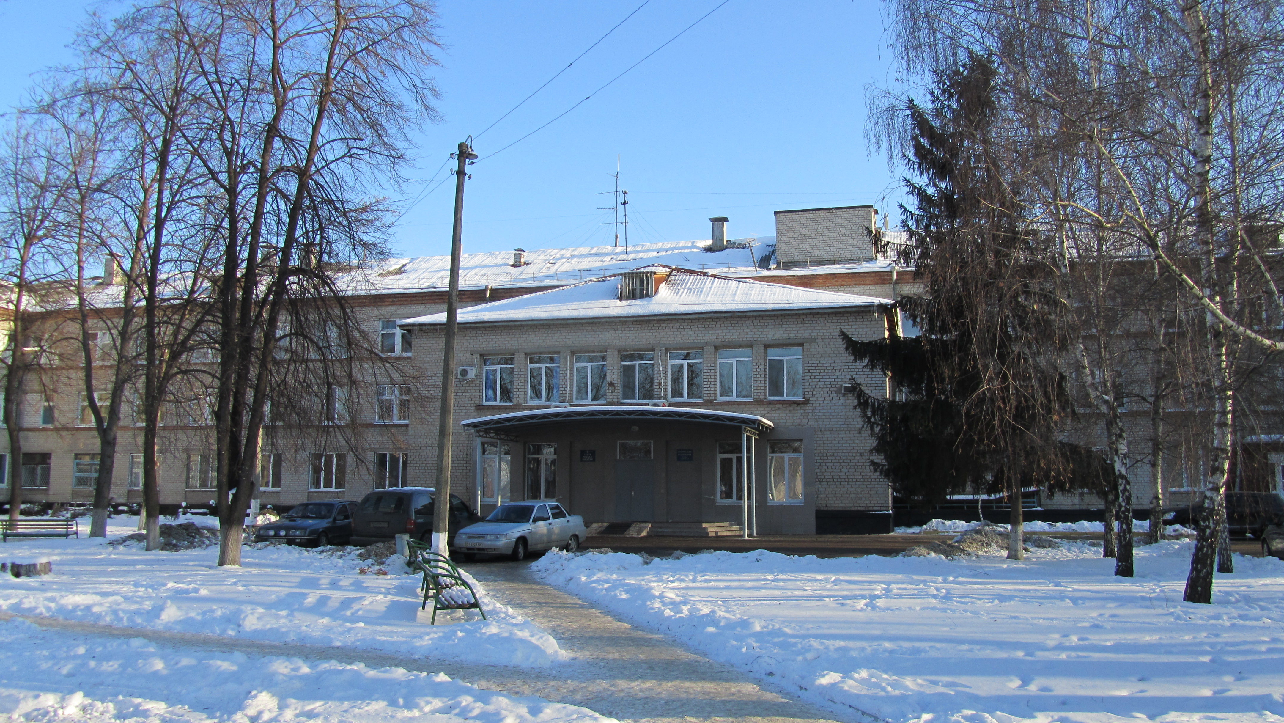 Третя міська лікарня у Кременчуці